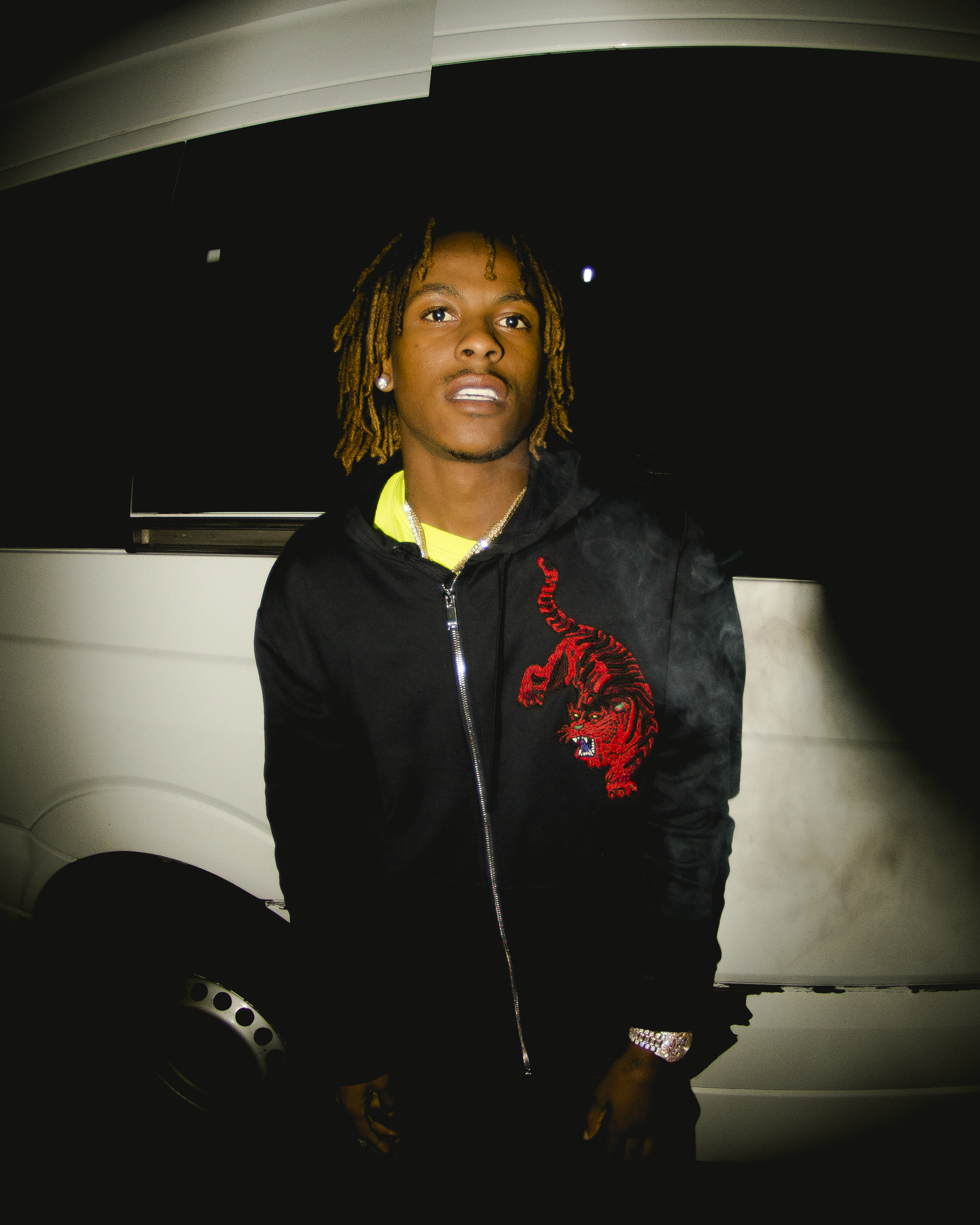 Rich the kid in Odessa?ukraine